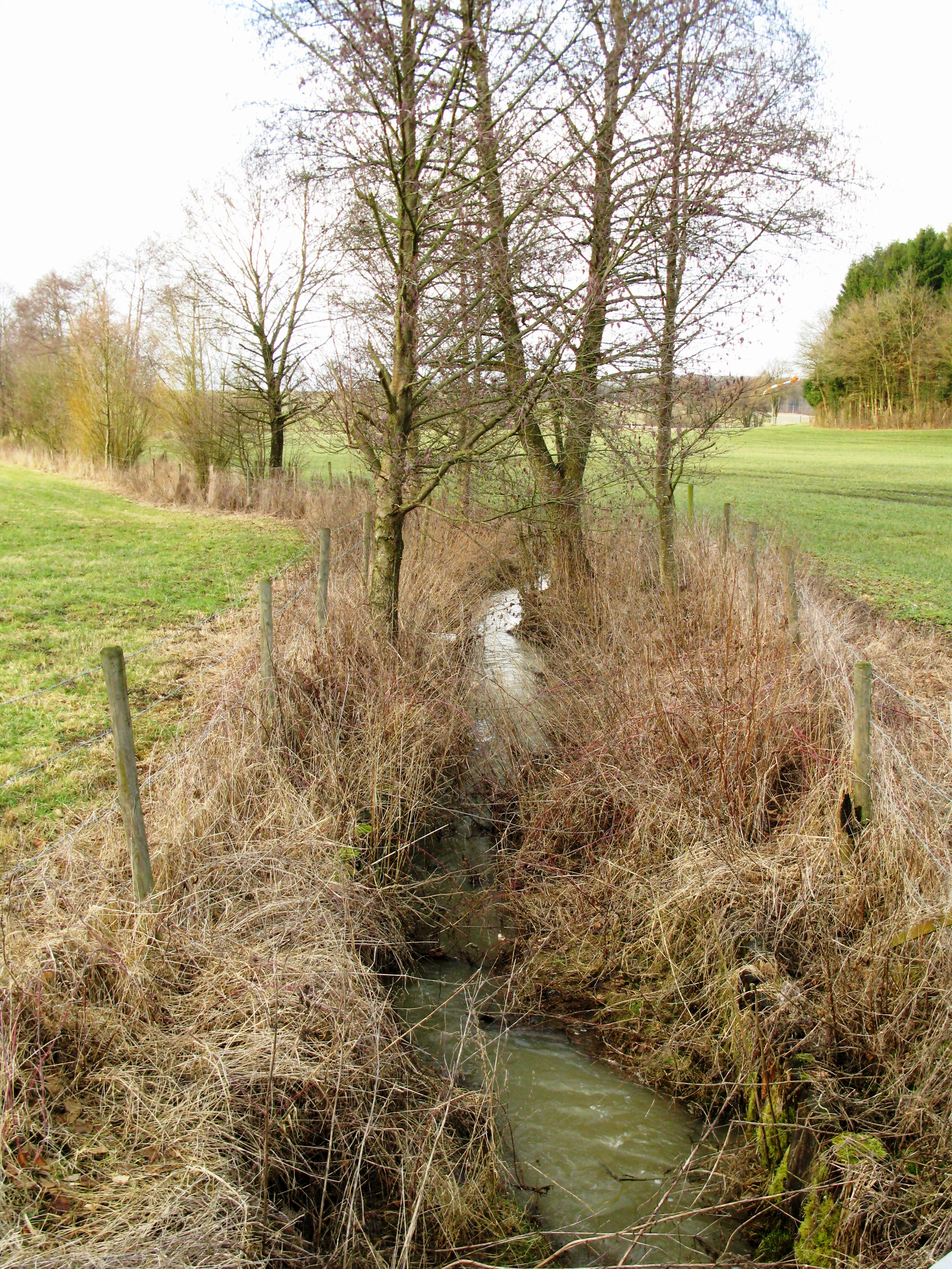 Hasselbaach bei Iener .